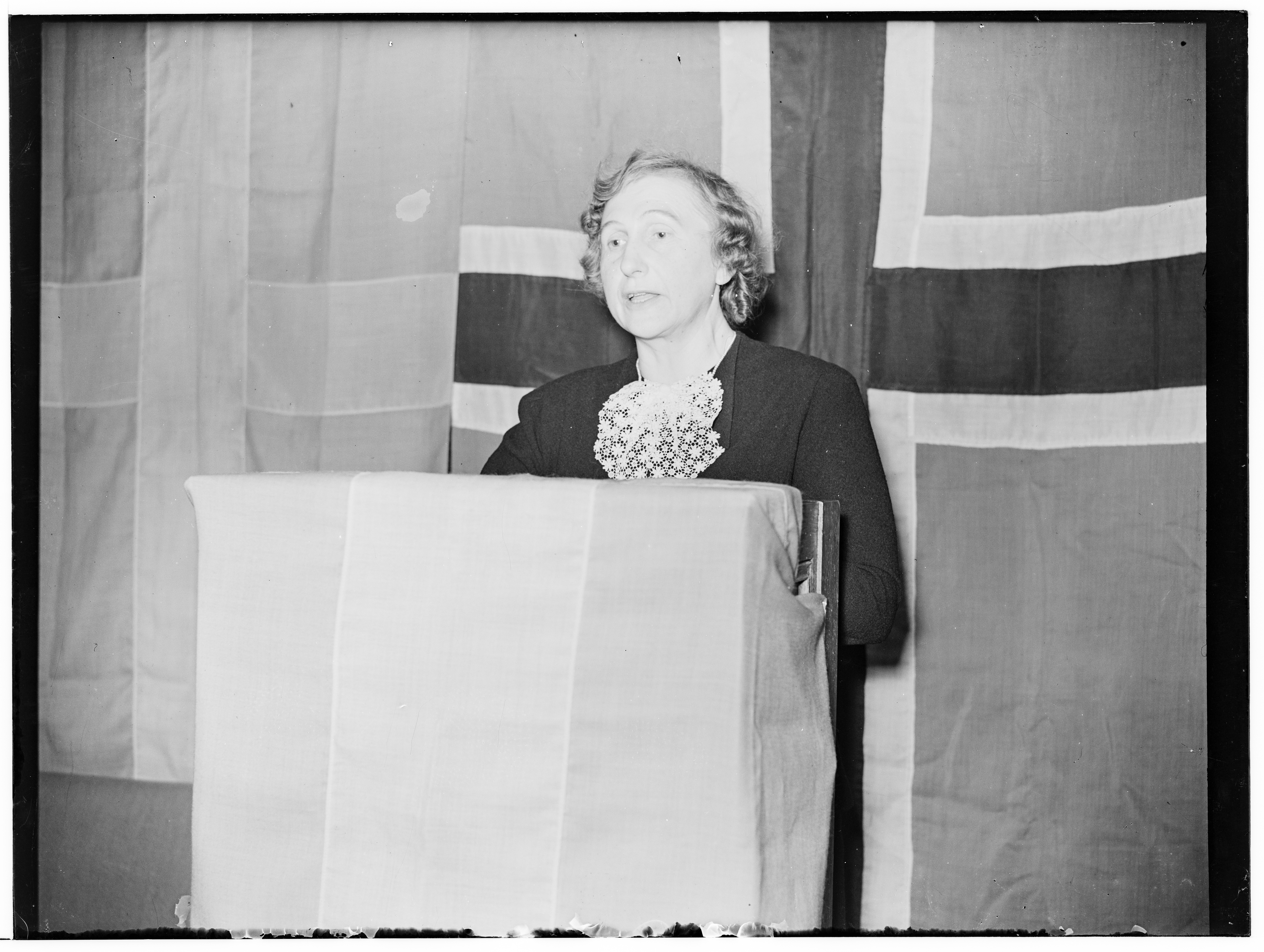 NS Kvinneorganisasjon. Møte i Stortingsgt. 20